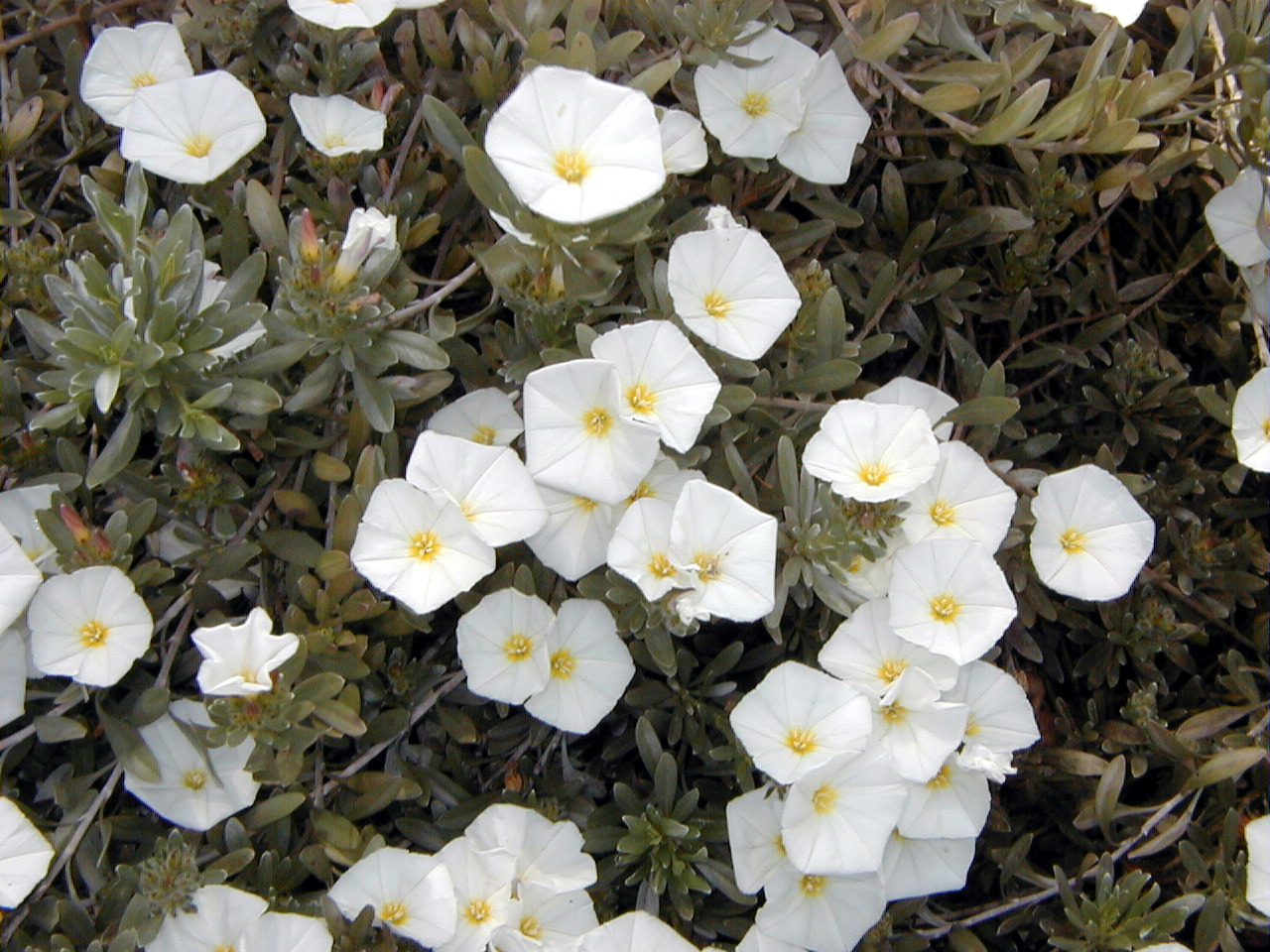 Convolvulus cneorum. Real Jardín Botánico de Madrid.